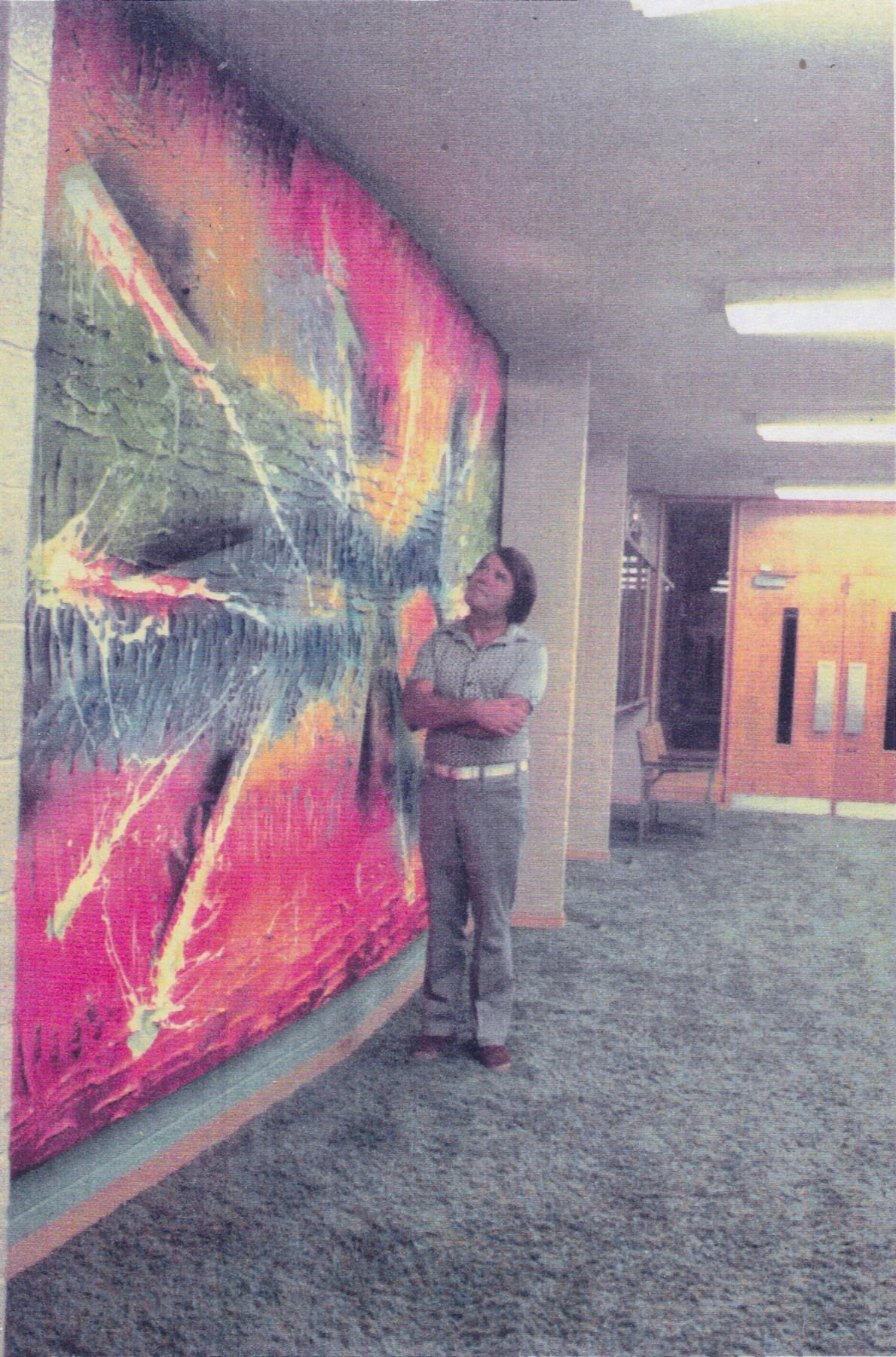 photographie de Fontaine et sa murale qu'il a fait en 1965 pour la NASA.